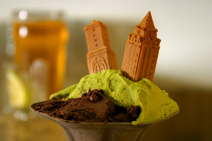 Gelato by Aaron Logan